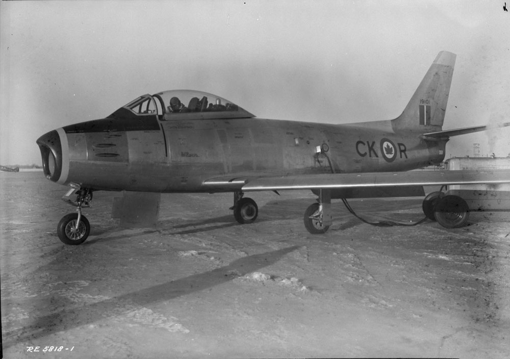 Canadair "Sabre" Mk. I aircraft 19101